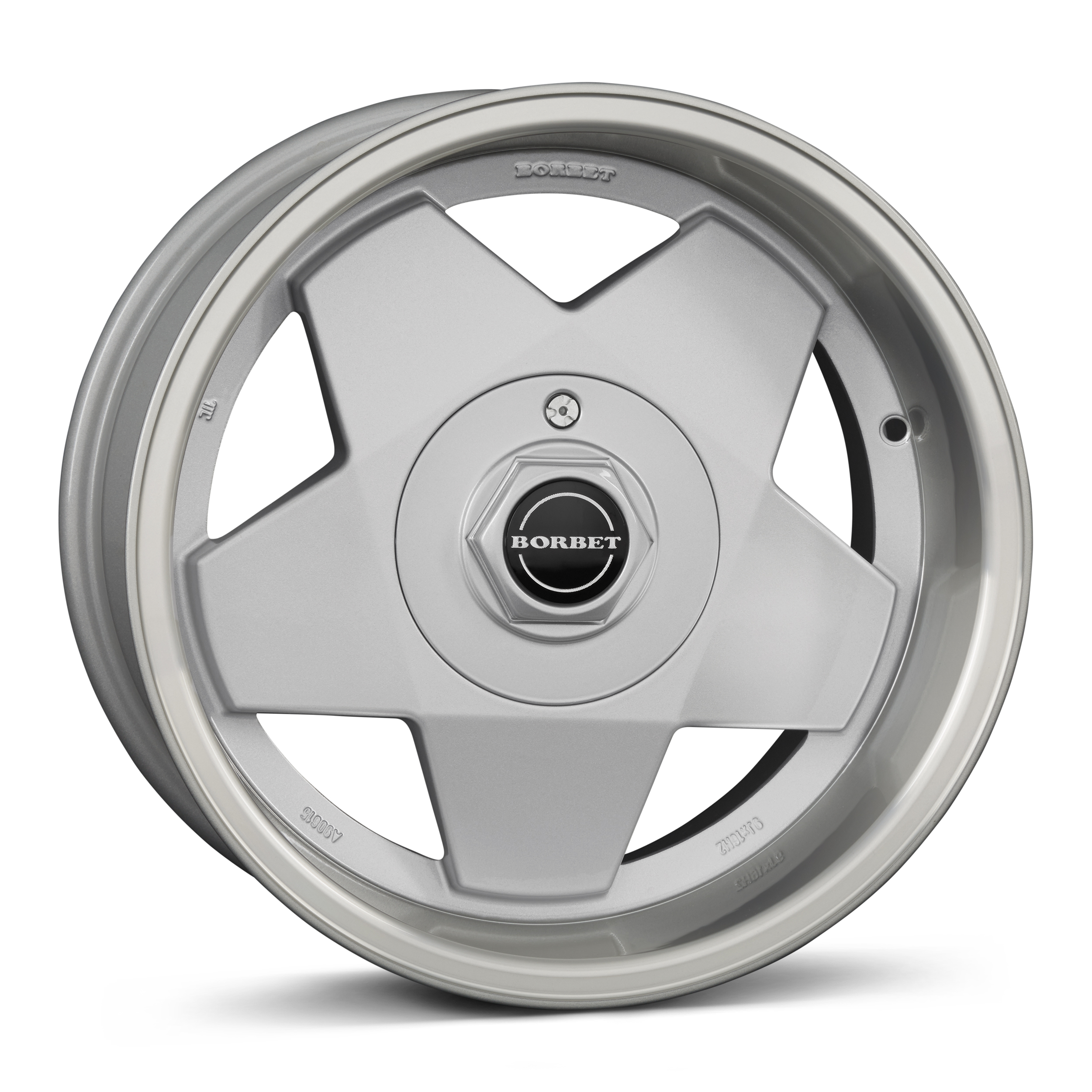 BORBET A Rad